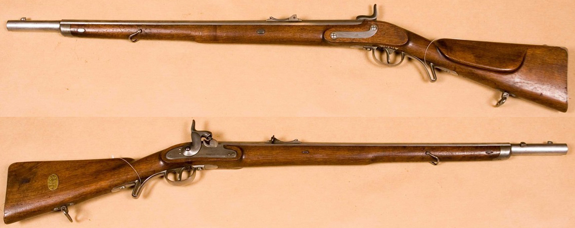 Puška Lorenz, model 1854.